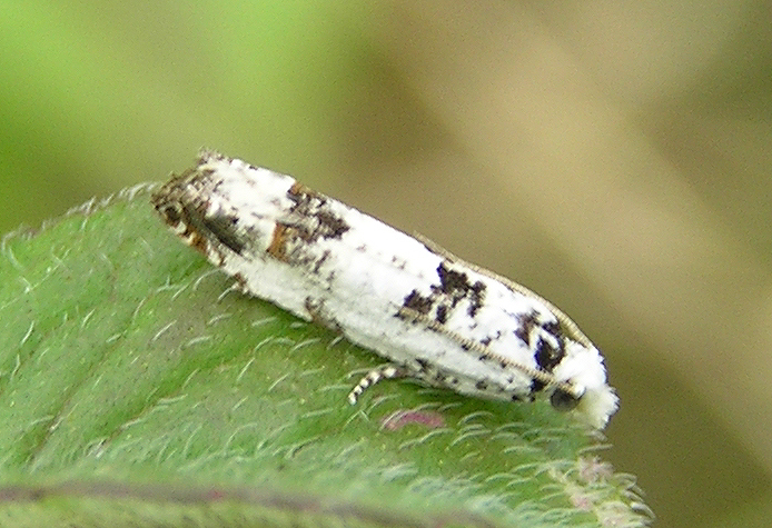 Eucosma campoliliana